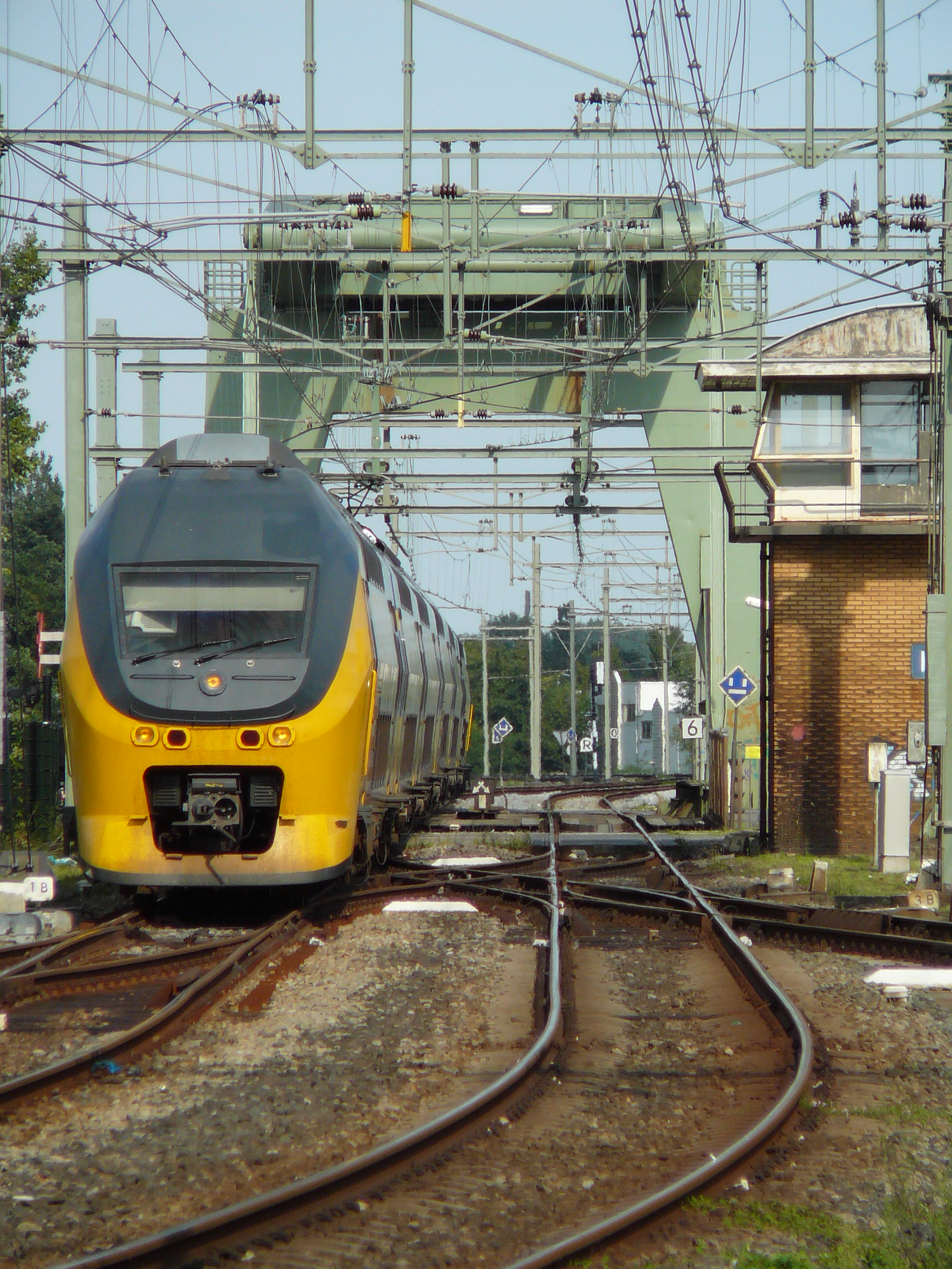 8638 Den Helder - Nijmegen, Alkmaar, 16.08.2008